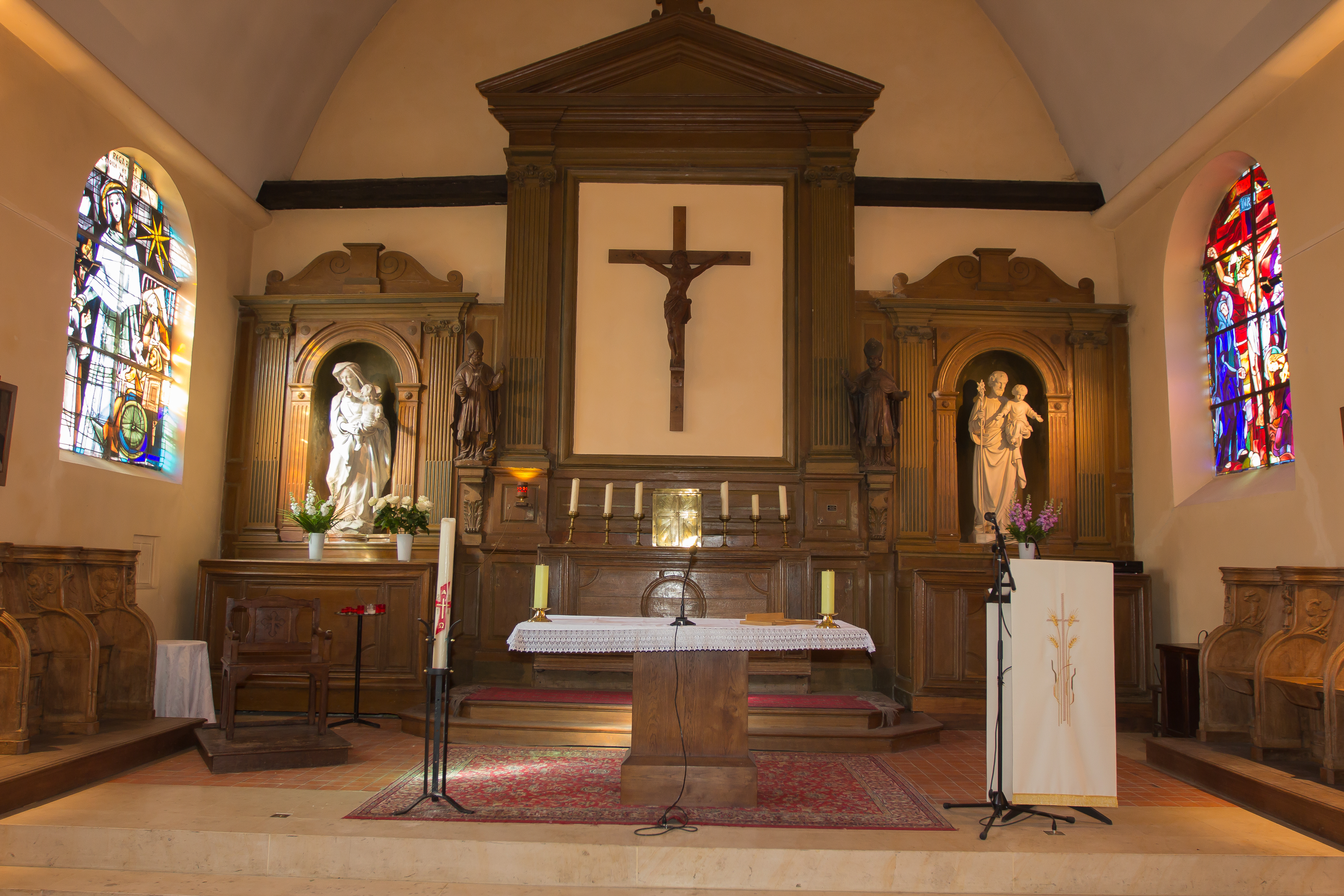 Intérieur de l'église de Villabé / Villabé / Essonne / France